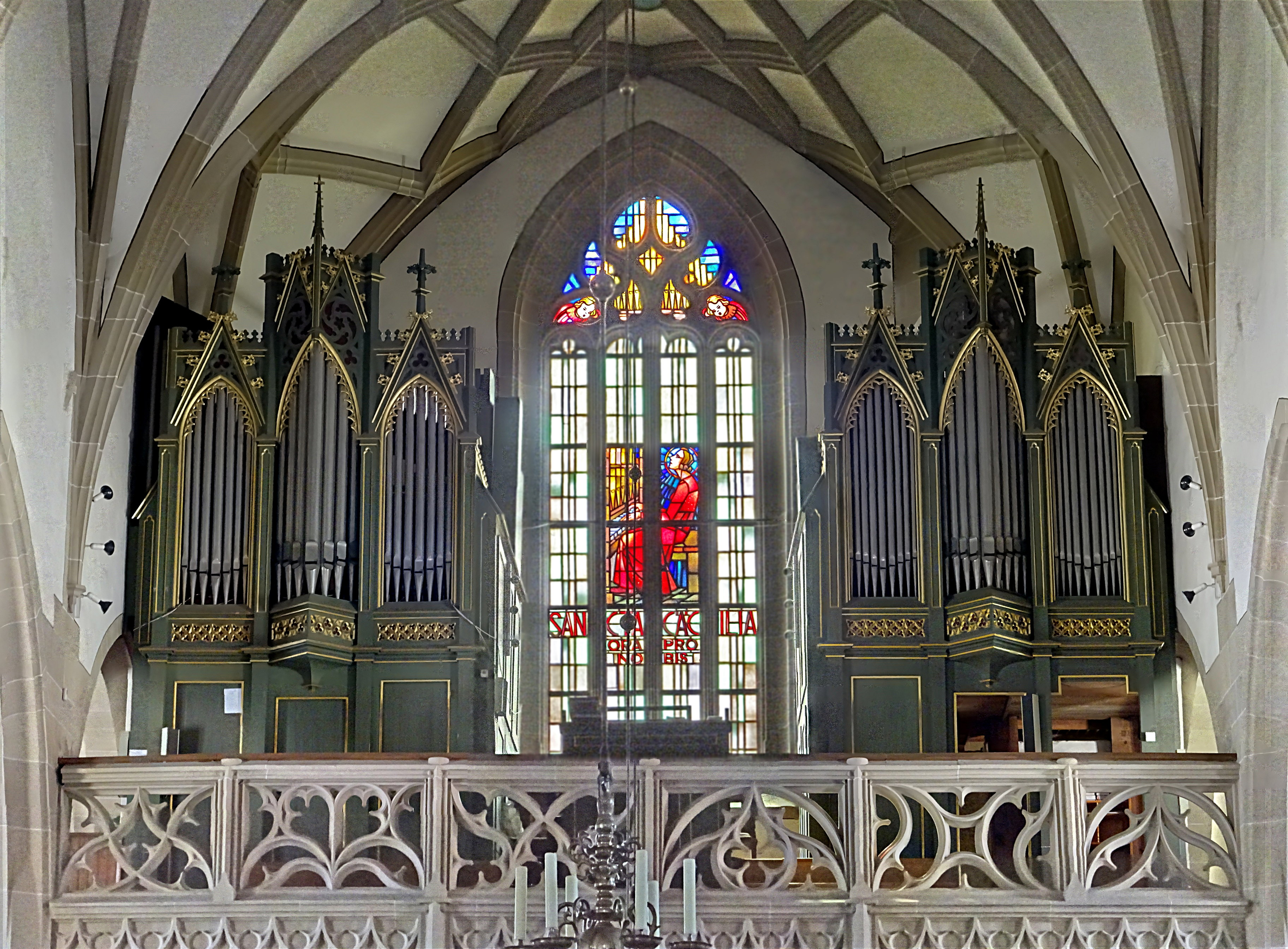 Orgel von Balthasar Schlimbach (1872 II/P28) in der Stadtpfarrkirche Mariä Himmelfahrt (Bad Königshofen im Grabfeld)[1]